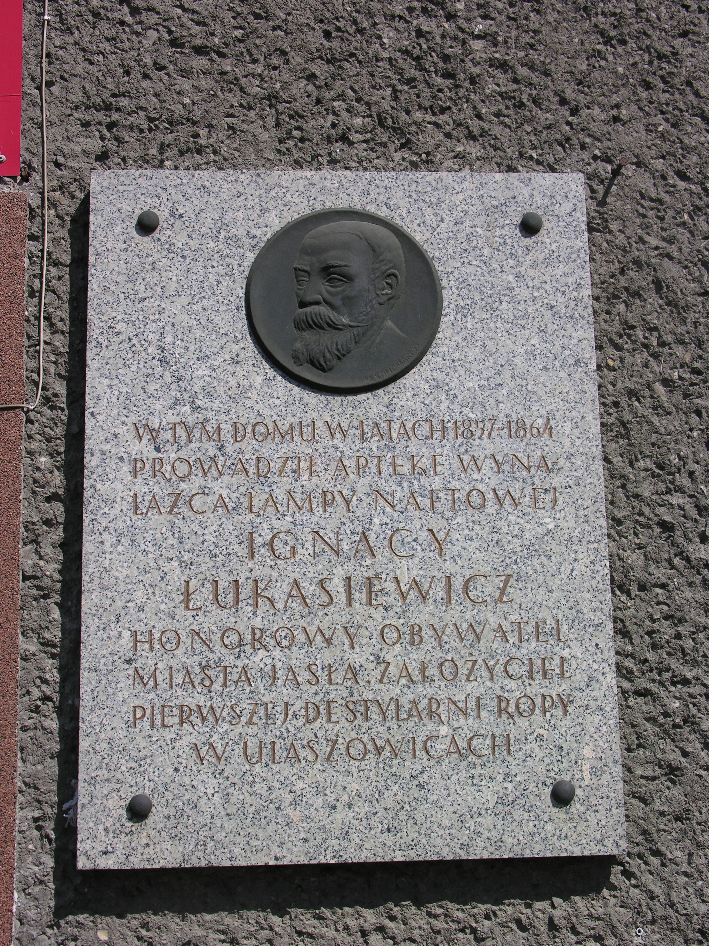 Tablica ku czci Ignacego Łukasiewicza w Jaśle, Rynek nr 17